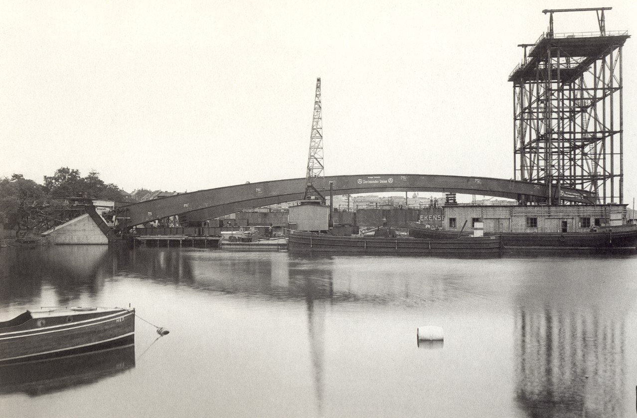 Västerbron i Stockholm under byggnation, 1933